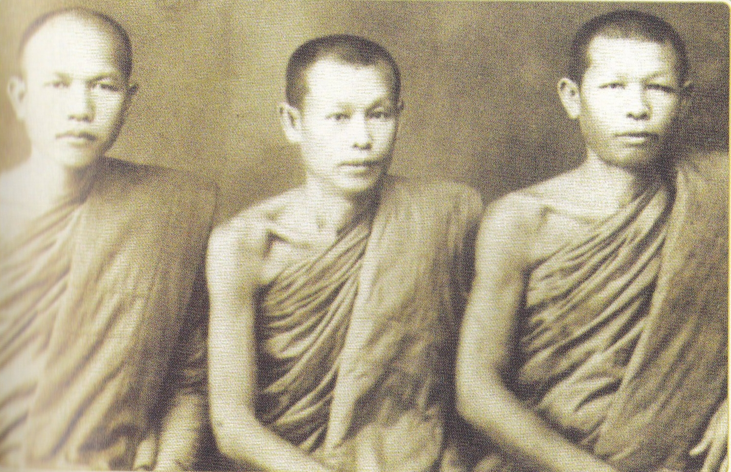 แม่ทัพแห่งกองทัพธรรมพระกรรมฐาน